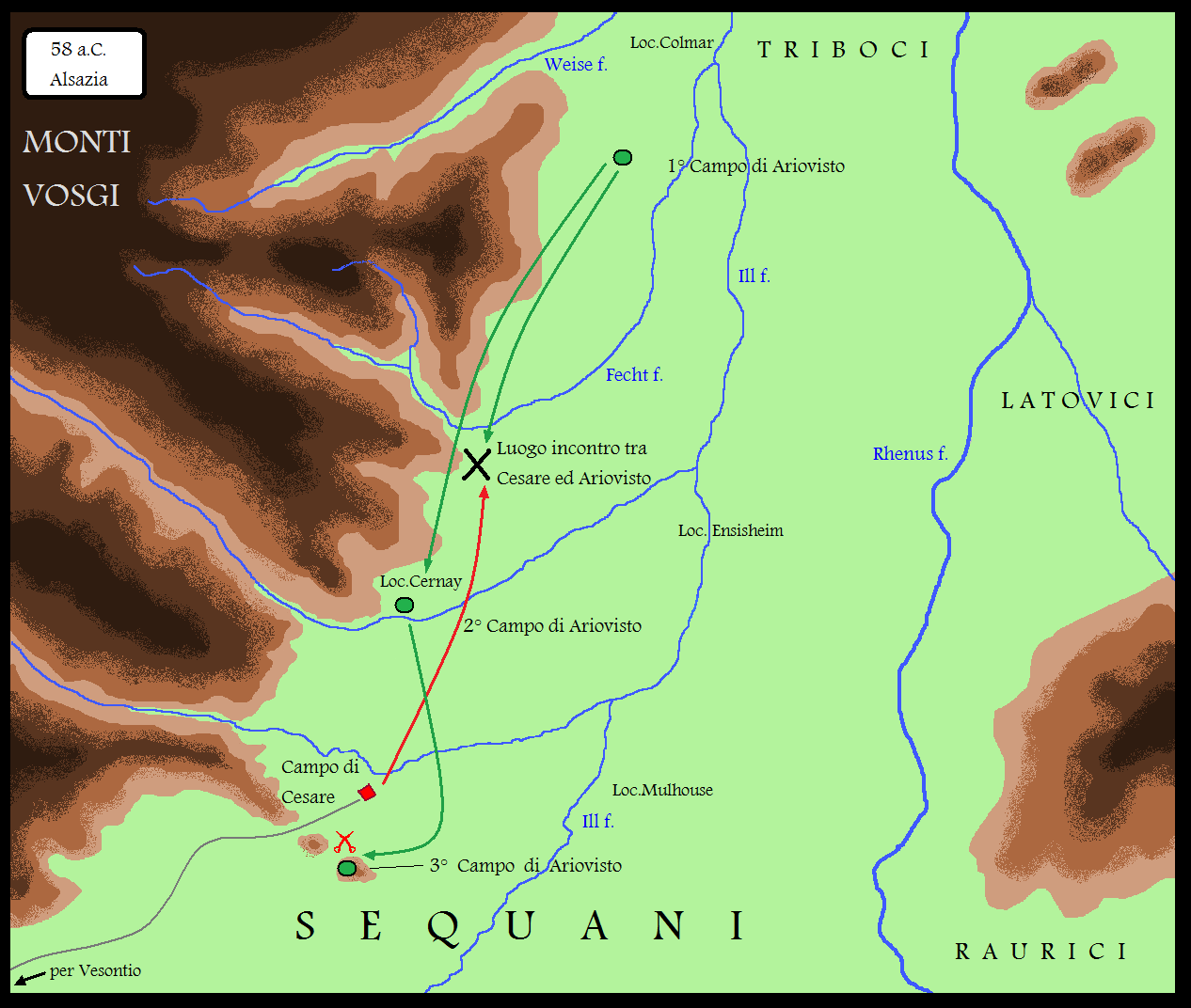 La battaglia combattuta in Alsazia tra Cesare (Romani) e Ariovisto (Germani) nel 58 a.C.